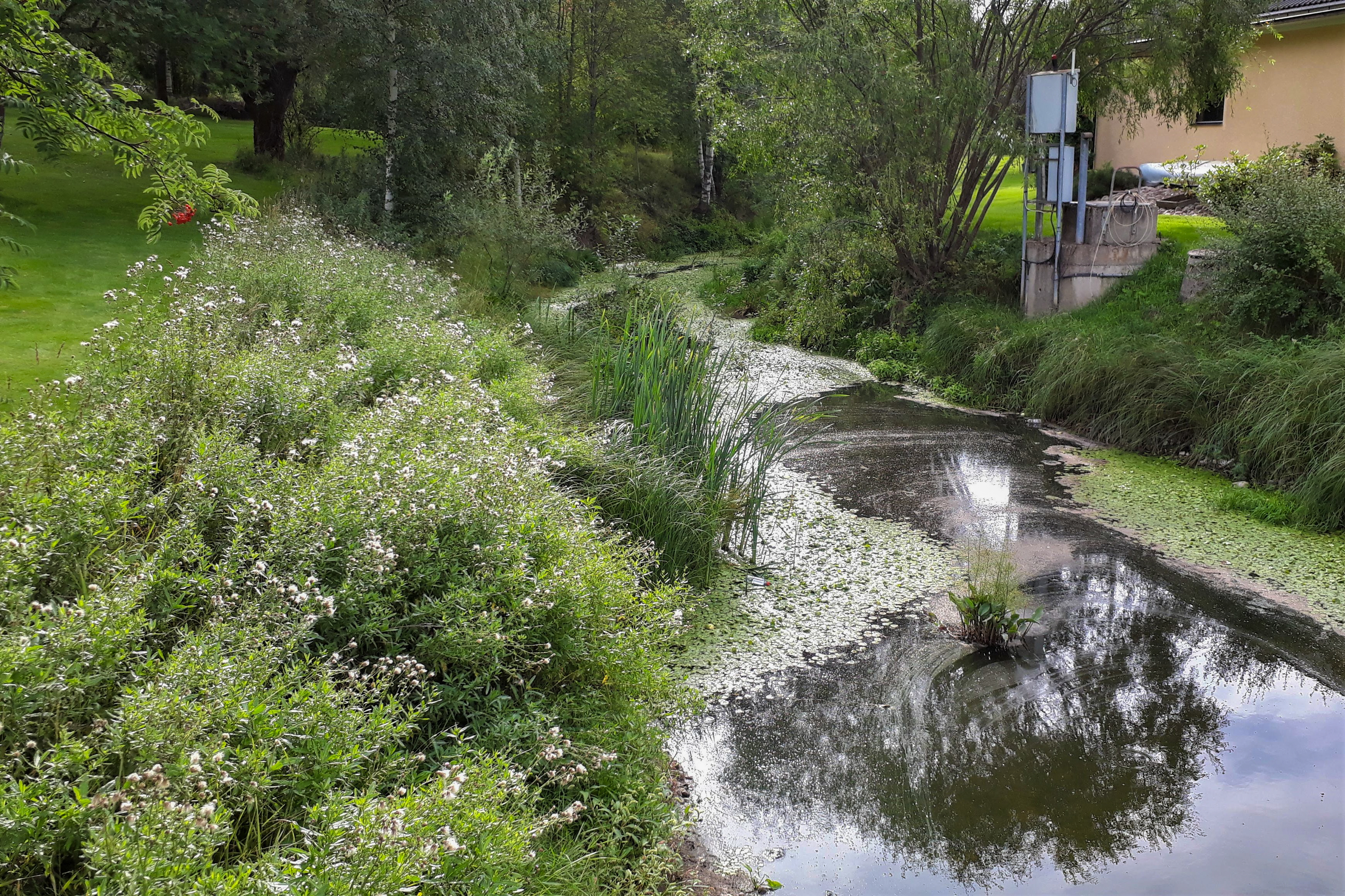 Broån, Hedemora, Dalarnas län, Sverige